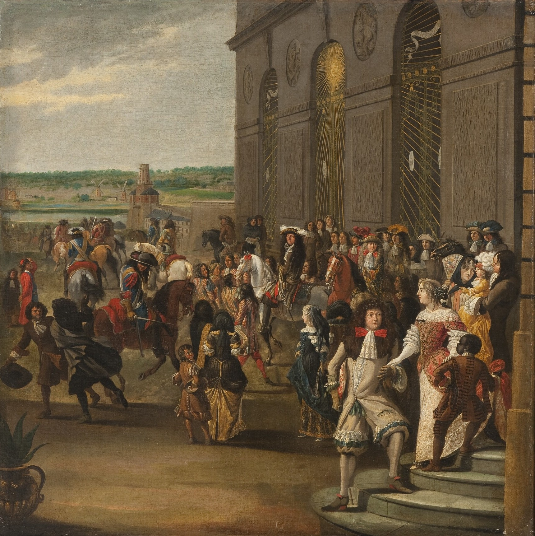 Louis XIV, à cheval, devant le grotte est suivi par son fils, le Grand Dauphin, lui aussi à cheval. Les costumes portés par les courtisans illustrent la mode des années 1670, à une époque où Versailles était encore une résidence d’agrément. La datation du tableau reste indécise en raison des incertitudes d'identification de certains personnages dont la femme au premier plan[1].